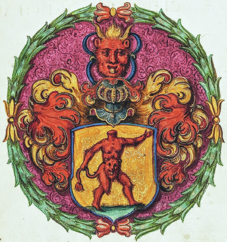 Wappen der schwedisch-dänischen Adelsfamilie Trolle